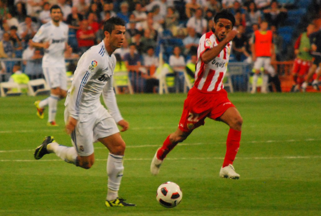 Cristiano Ronaldo et Fabián Vargas lors d'un match entre le Real Madrid et l'UD Almería.